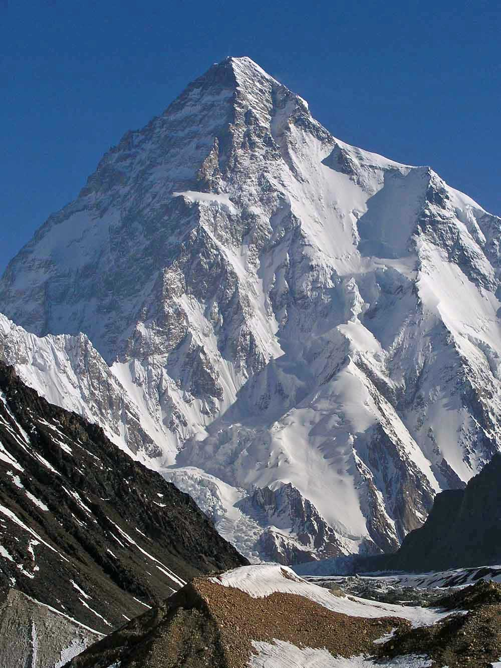 K2 in summer K2 im Sommer Ersteinstellung: (del) (cur) 22:06, 14 November 2004 . . Szumyk (Talk / contribs) . . 1000x1333 (161,949 bytes) (z enwiki) Bild aufgehelt